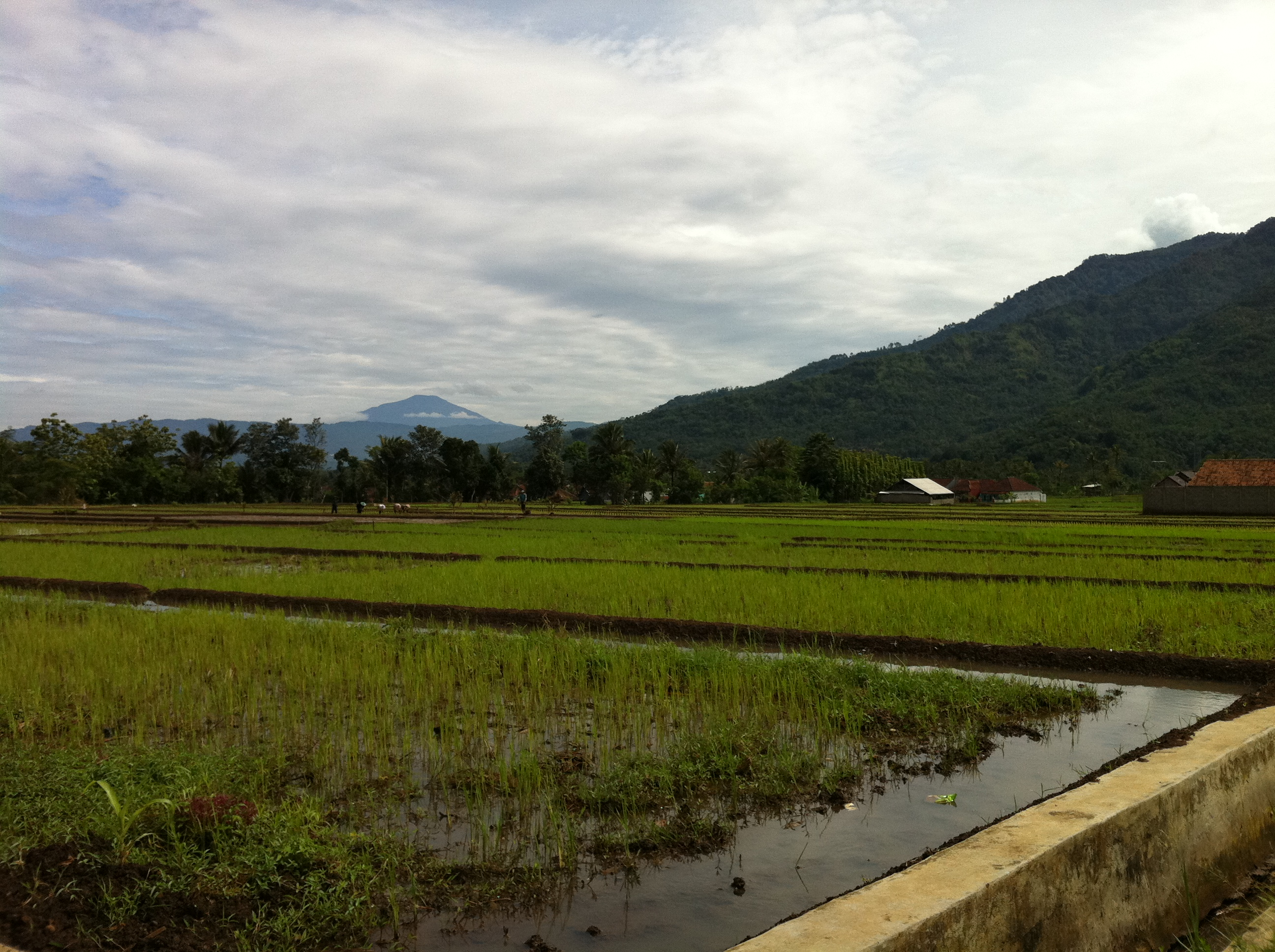 tonjong